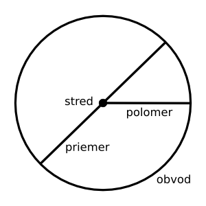 Kružnica a jej popis